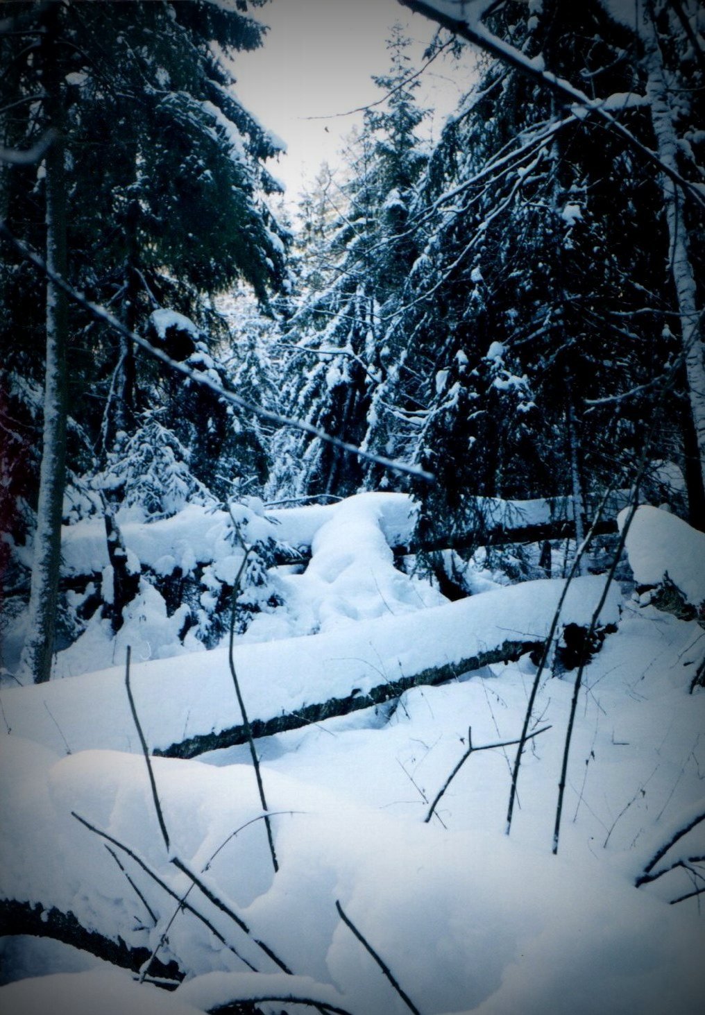 Autor: Adrian Grzegorz